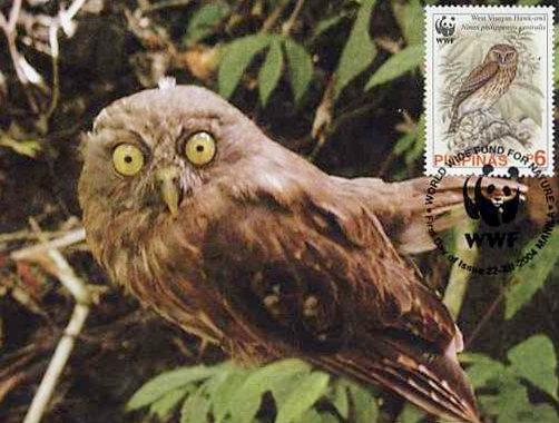 Ninox philippensis centralis